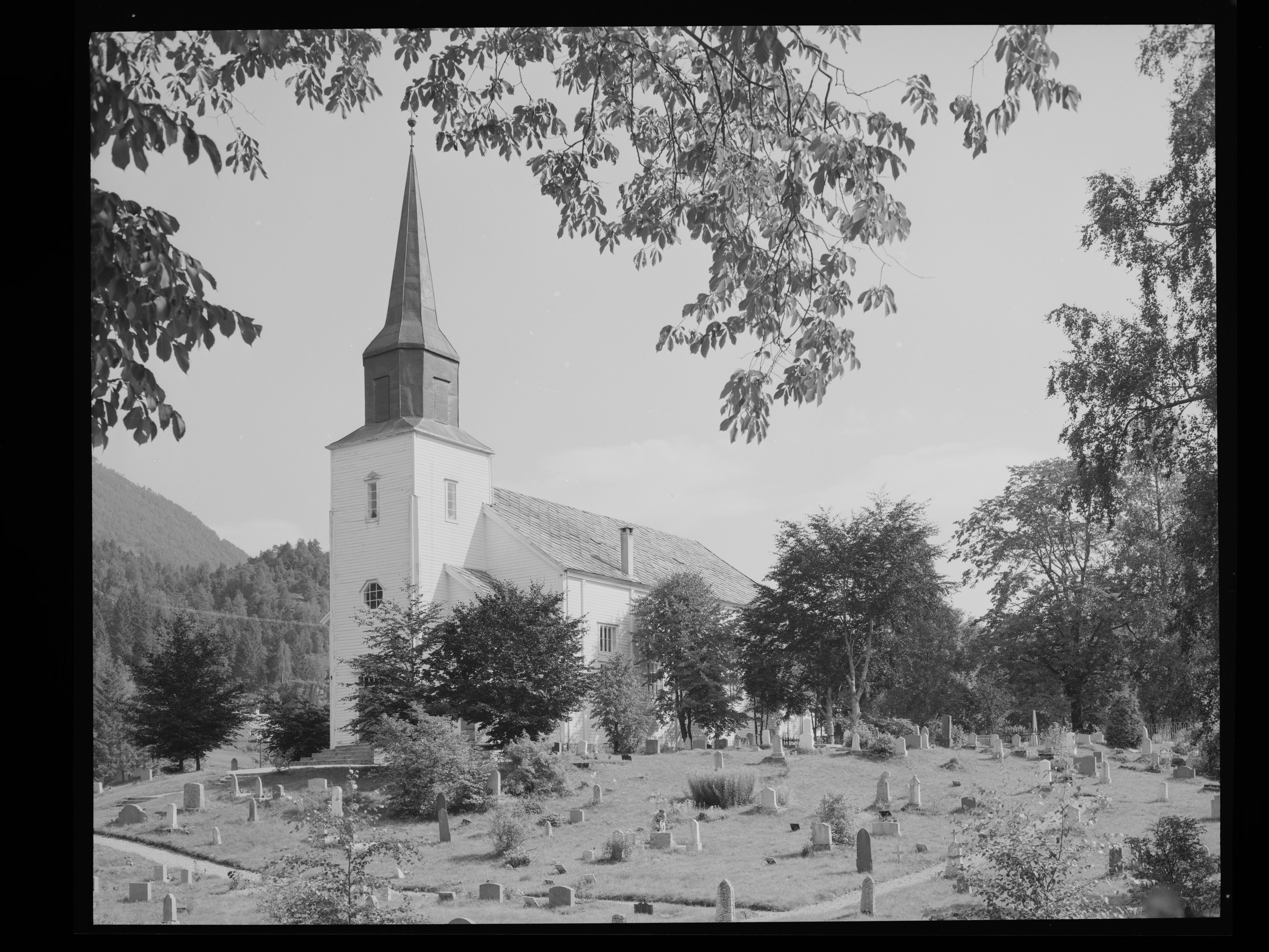 Bildet er hentet fra Nasjonalbibliotekets bildesamling. Anmerkninger til bildet var: Fotograf: ÅM Førde, Førde, Sogn og Fjordane